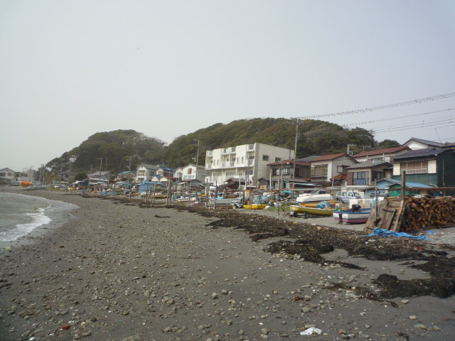 佐島漁港の港町